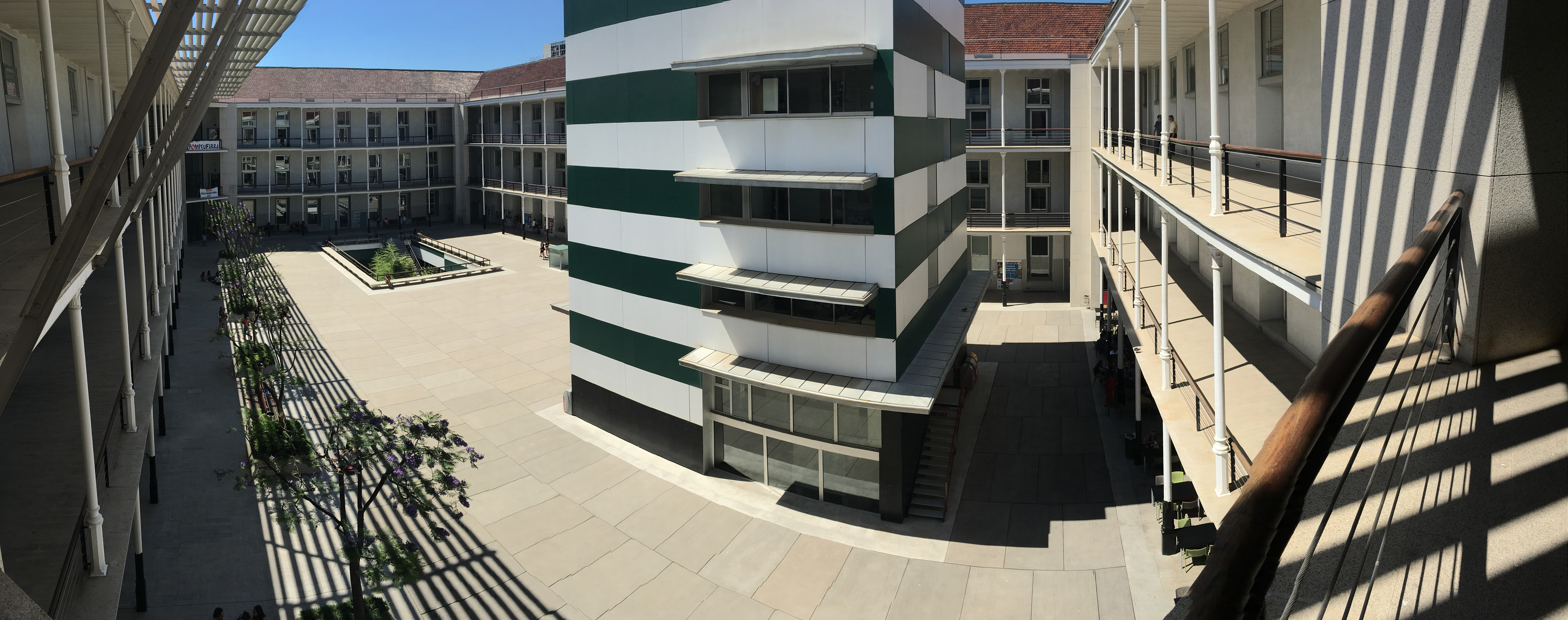 Patio del campus universitario de la UPF.